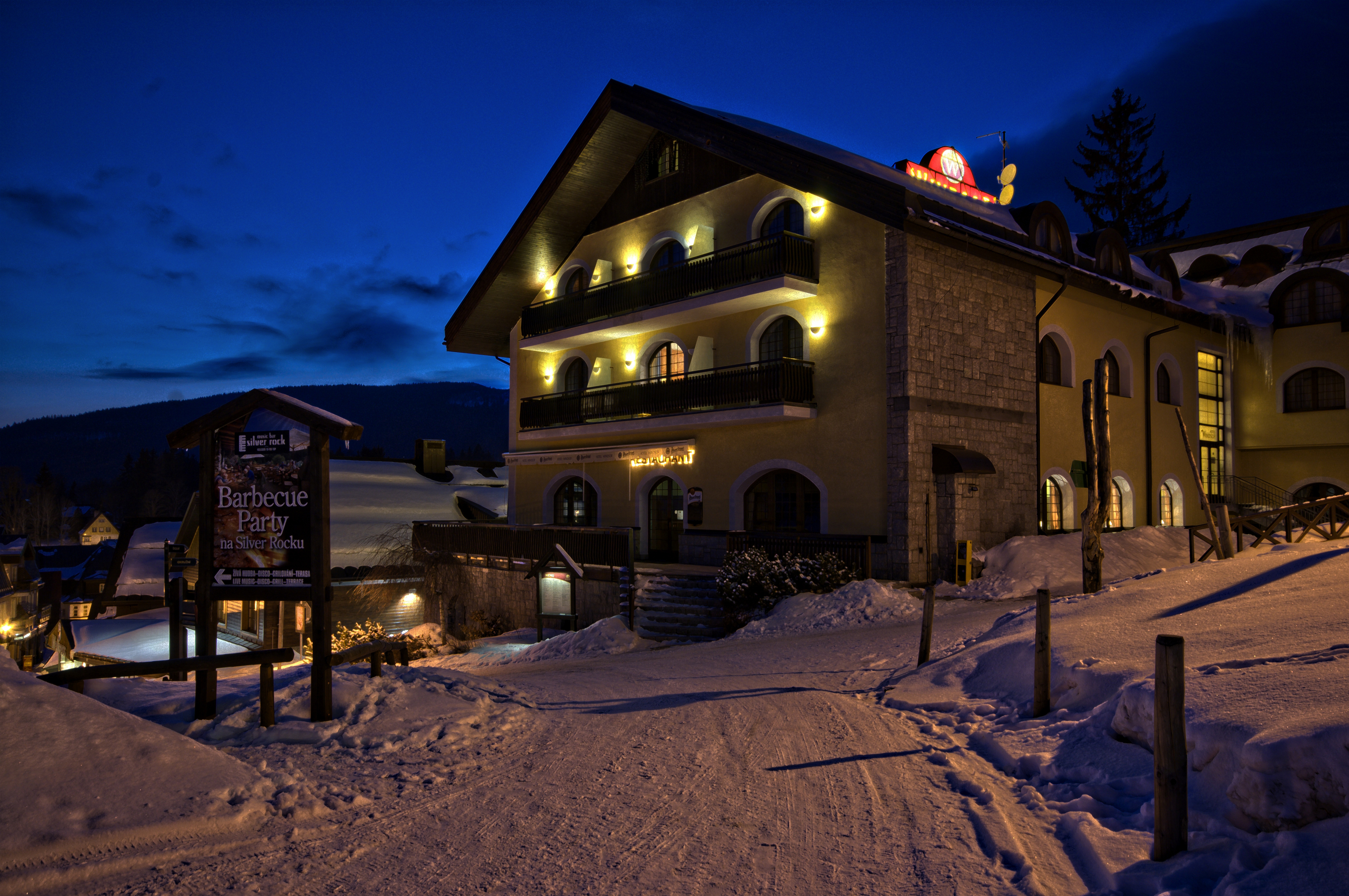 Špindlerův Mlýn v noci